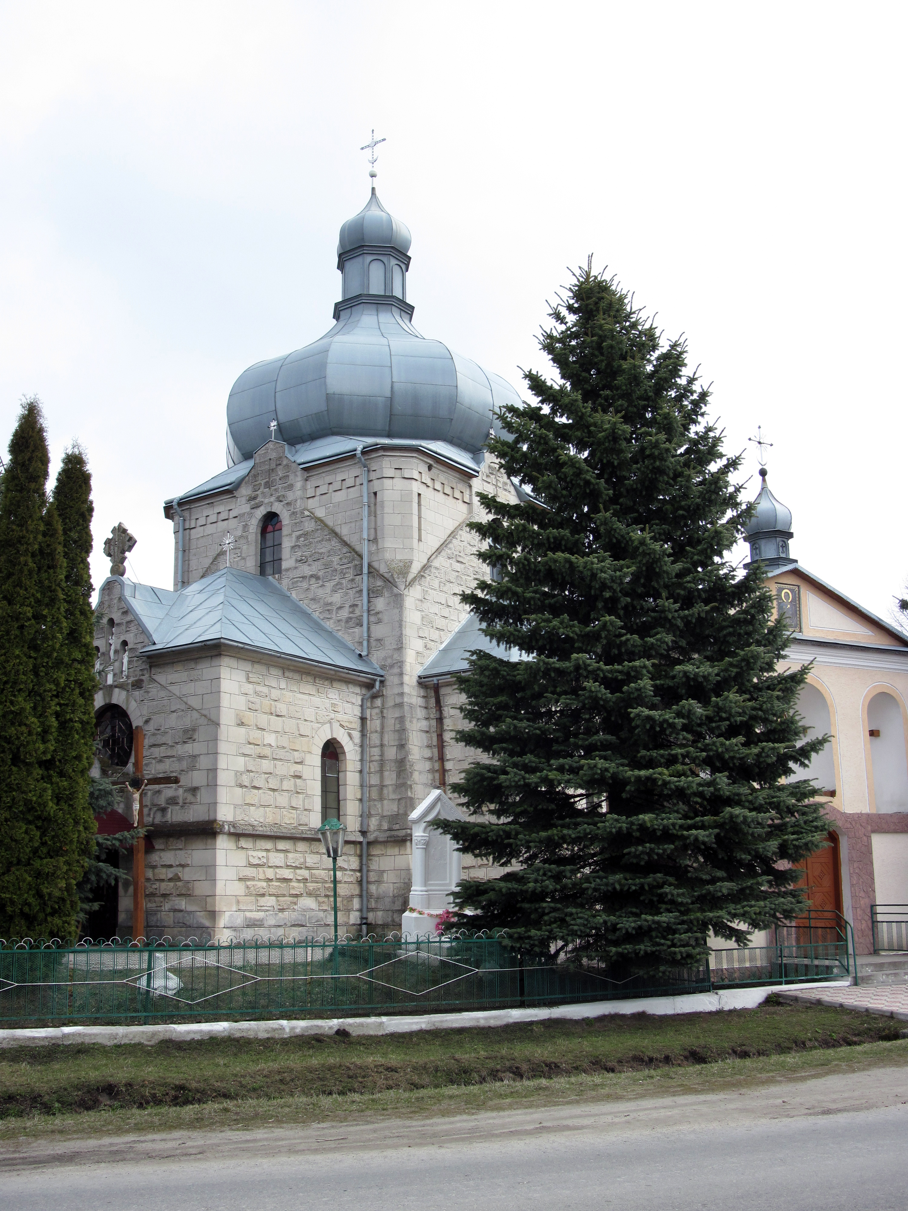 церква Св. Димитрія Солунського у с. Новики (Збаразький район)